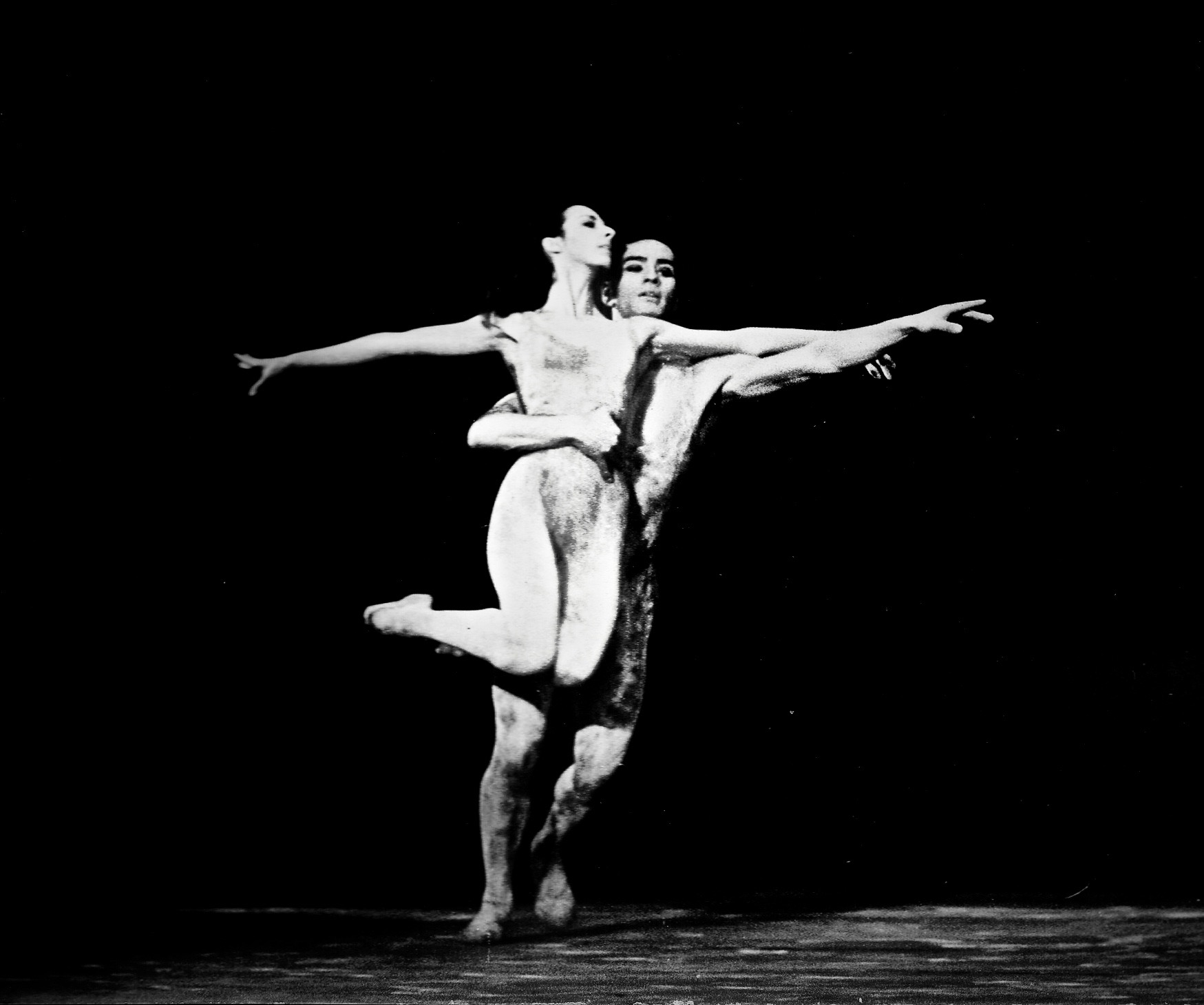 Ballet en Sudamerica